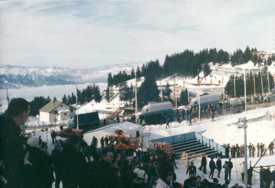 Installations olympiques à Chamrousse lors des Jeux Olympiques de 1968